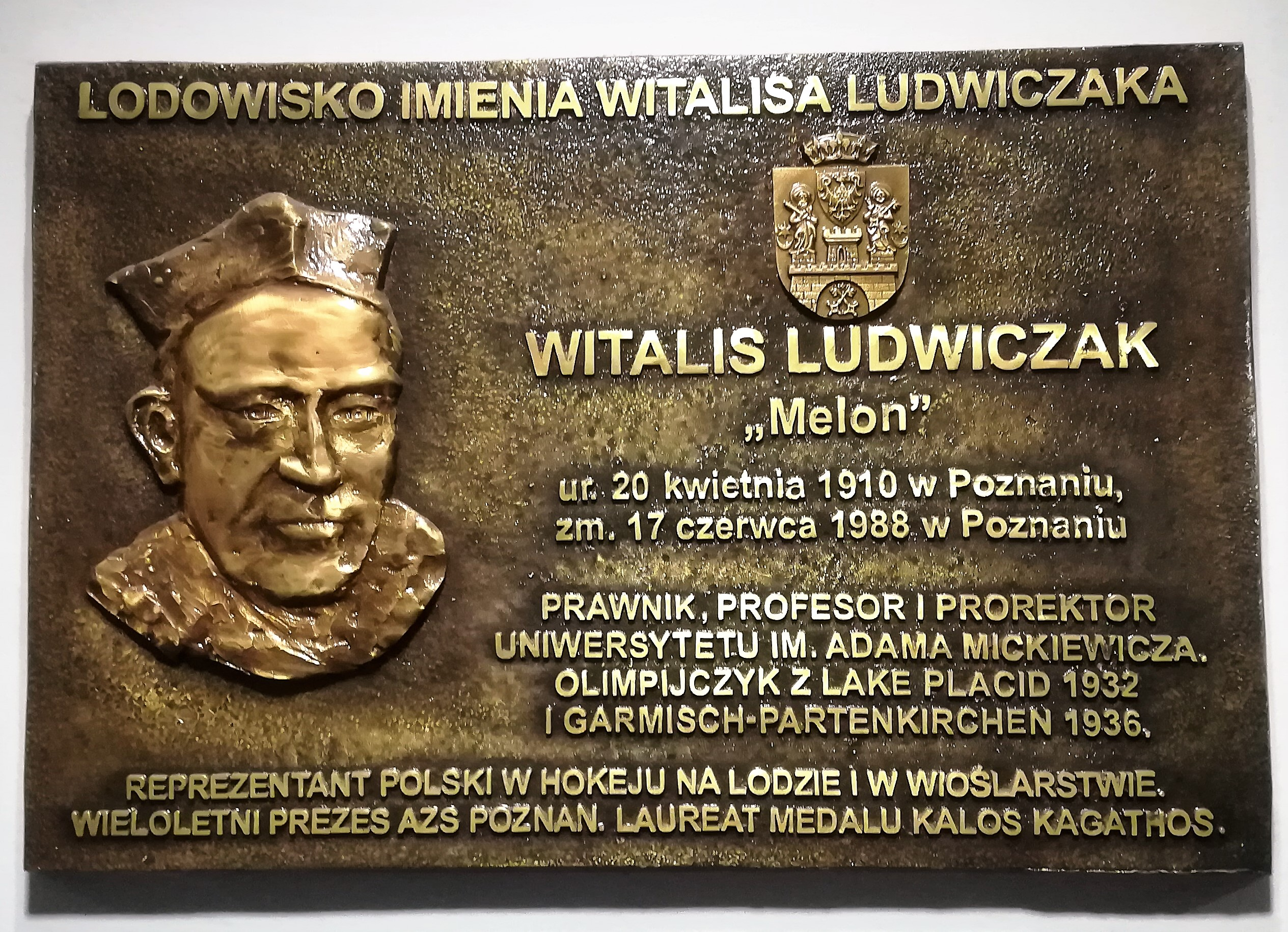 Lodowisko Chwiałka imienia Witalisa Ludwiczaka w Poznaniu.